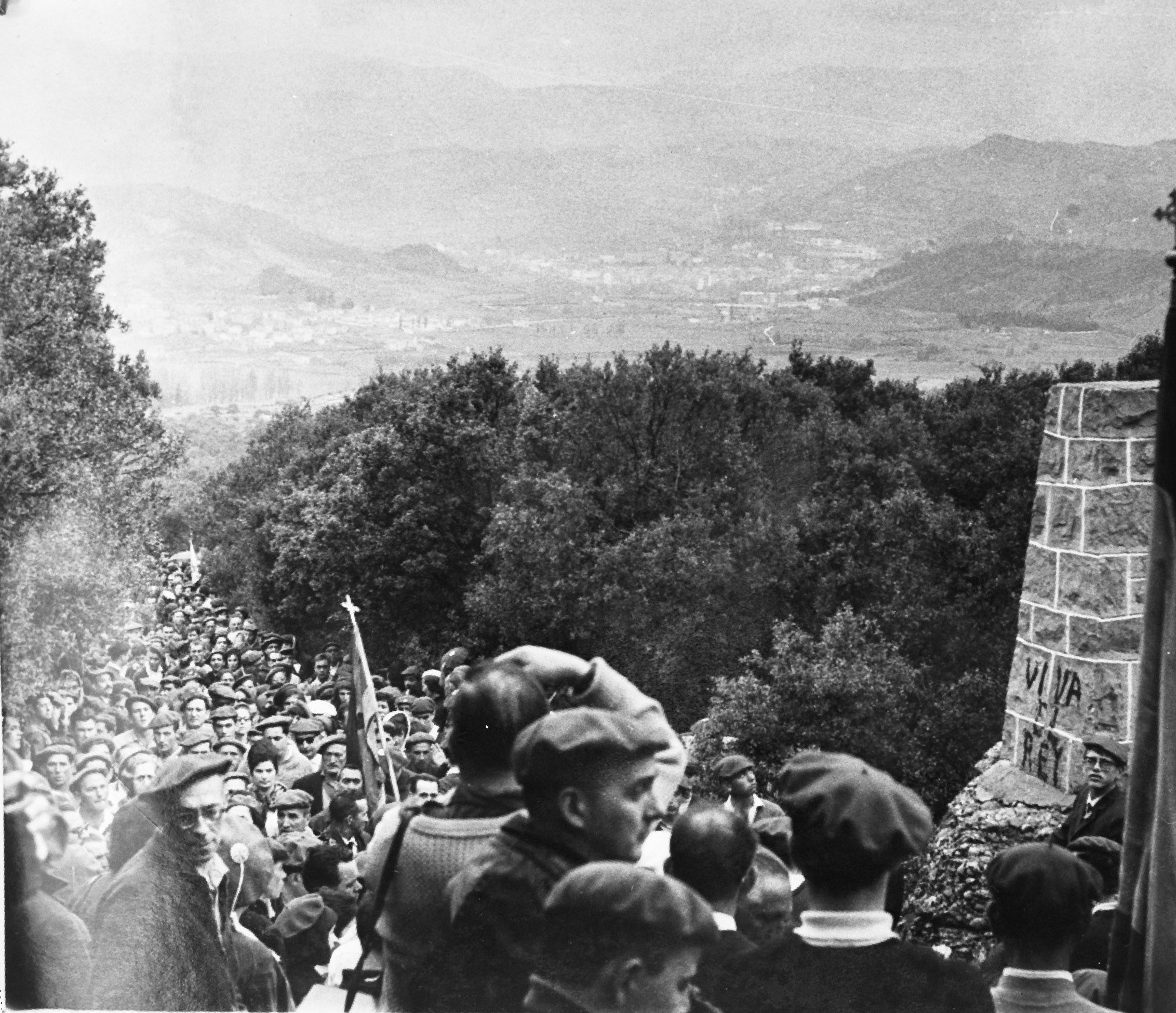 La Princesa Irene de Holanda en el viacrucis de Montejurra 28 de mayo de 1973